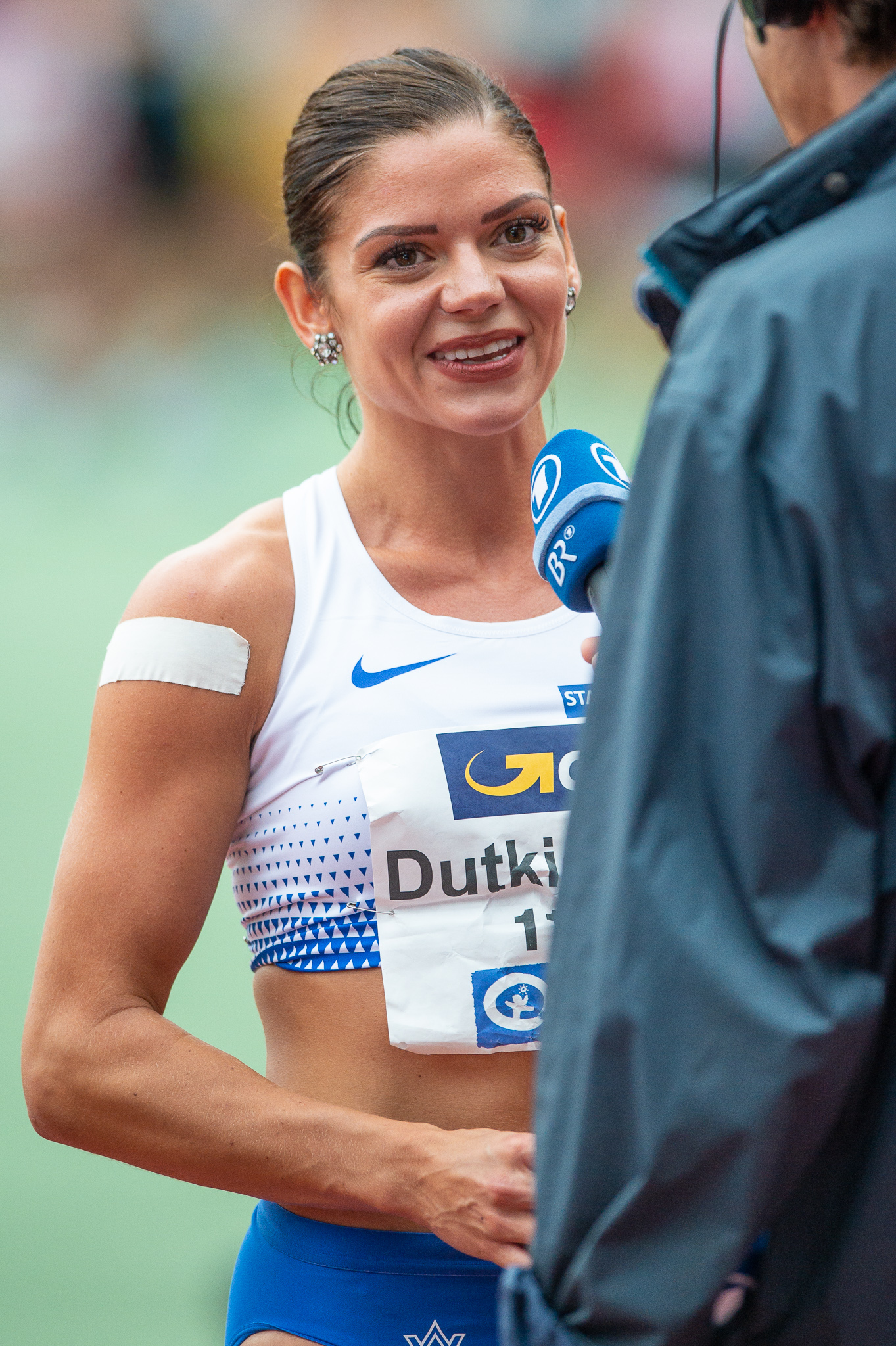 100-Meter-Hürdenlauf,DLV,Deutsche Leichtathletik Meisterschaften 2018,Deutscher Leichtathletik-Verband,Max-Morlock-Stadion,Pamela Dutkiewicz